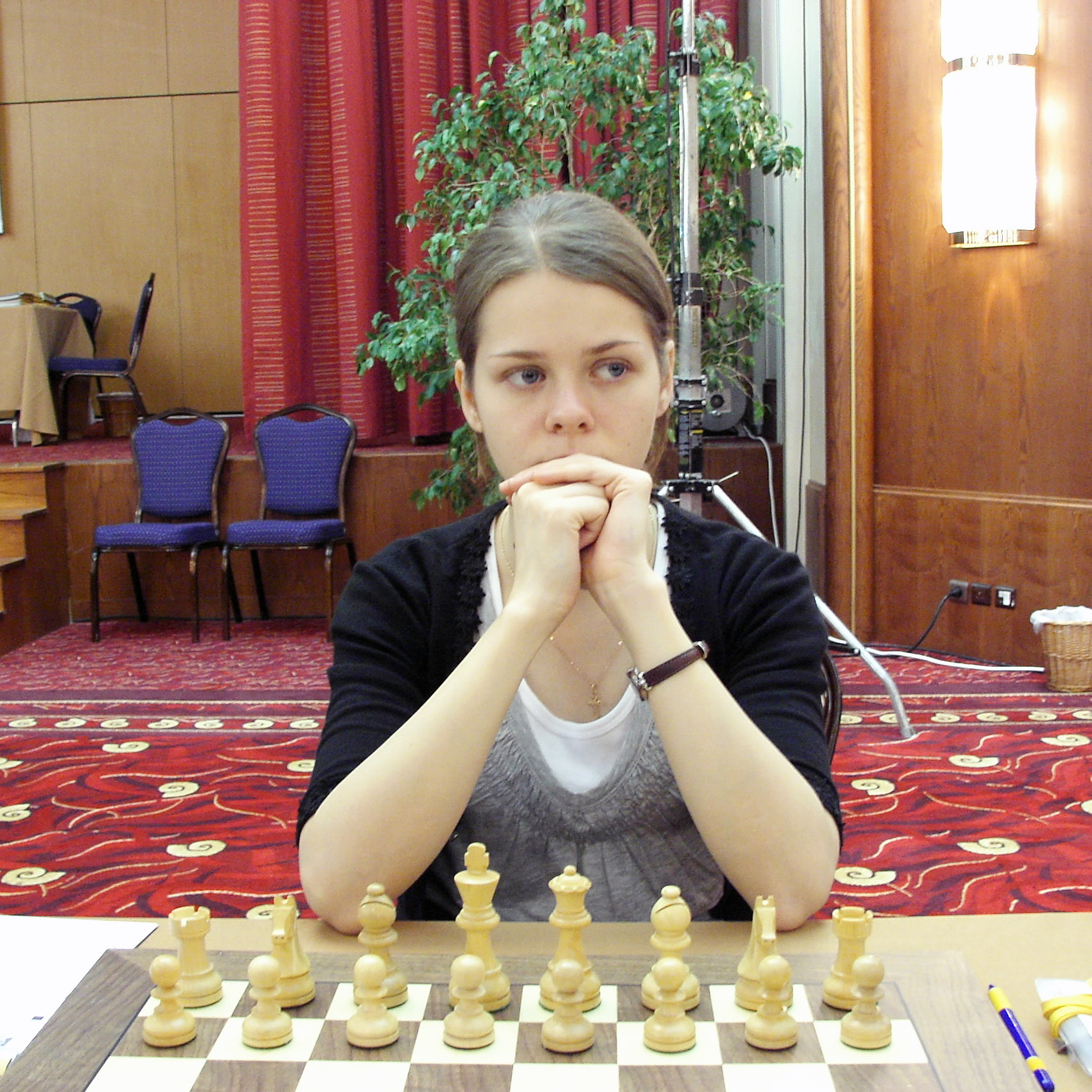 WGM Tatiana Kosintseva Russia, EuroChess Iraklion 2007